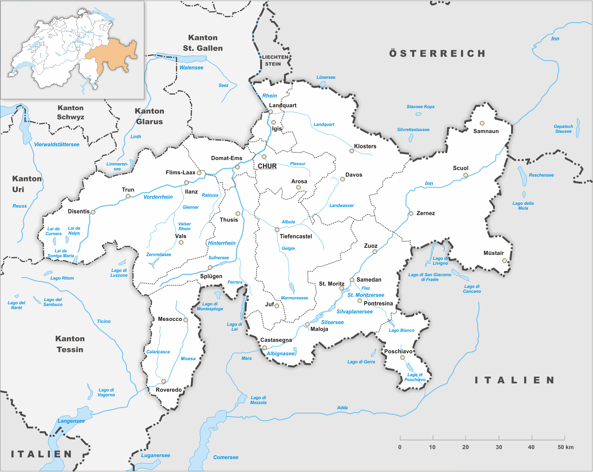 Karte des Kanton Graubünden.